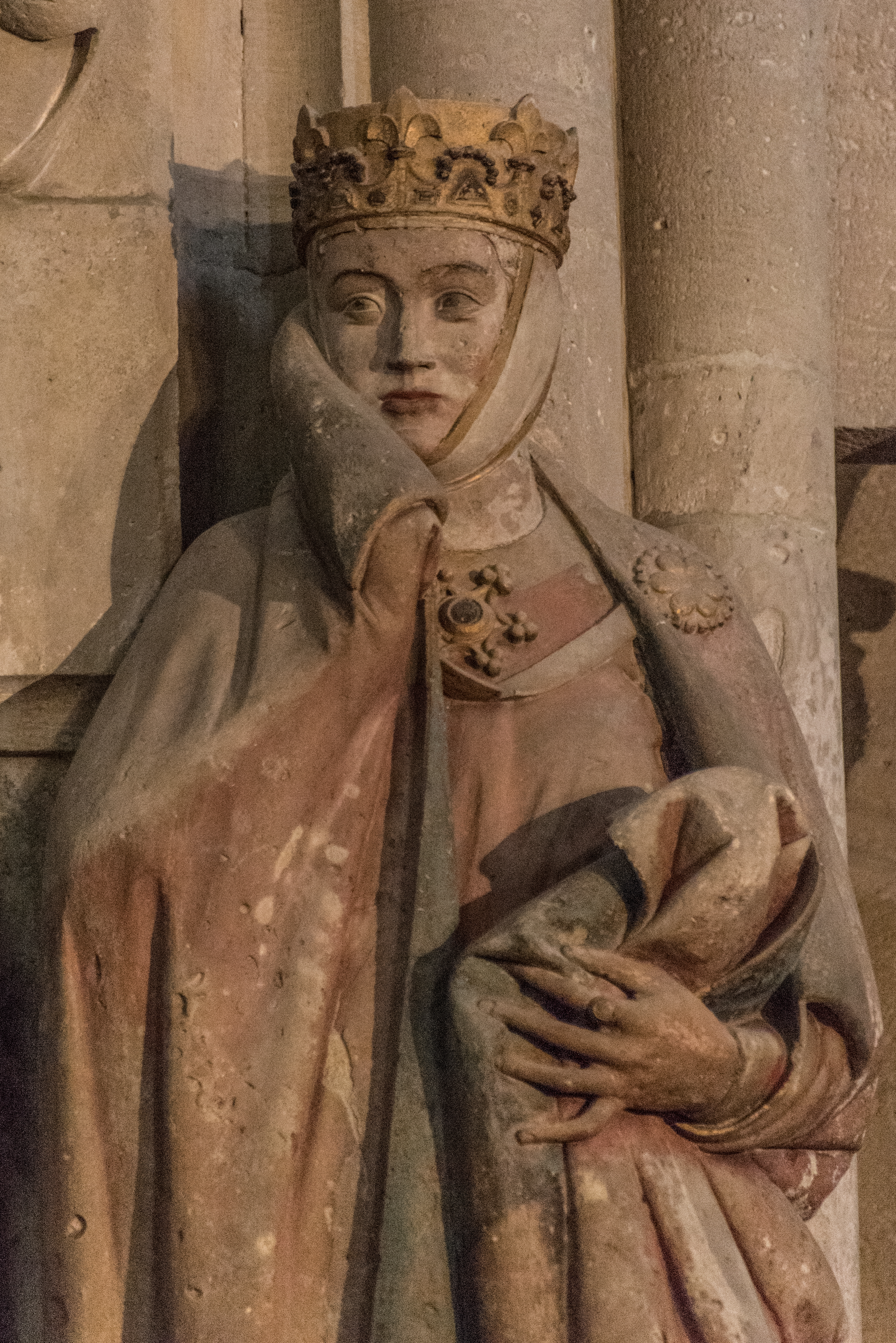 Naumburg an der Saale, Dom, Stifter Markgraf Ekkehard II. und Uta